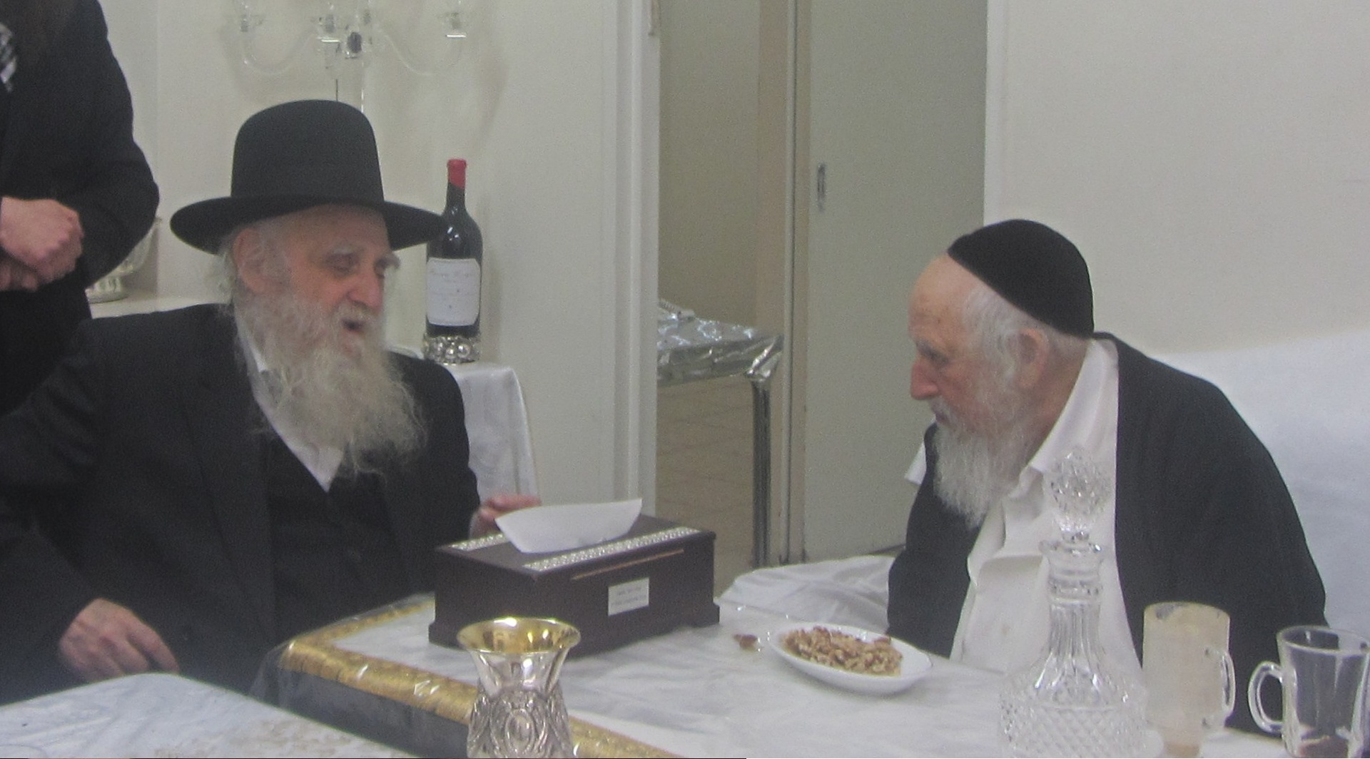 הגאון רבי צבי פרידמן בביתו של מרן רבי שמואל אויערבך פסח תשע"ג